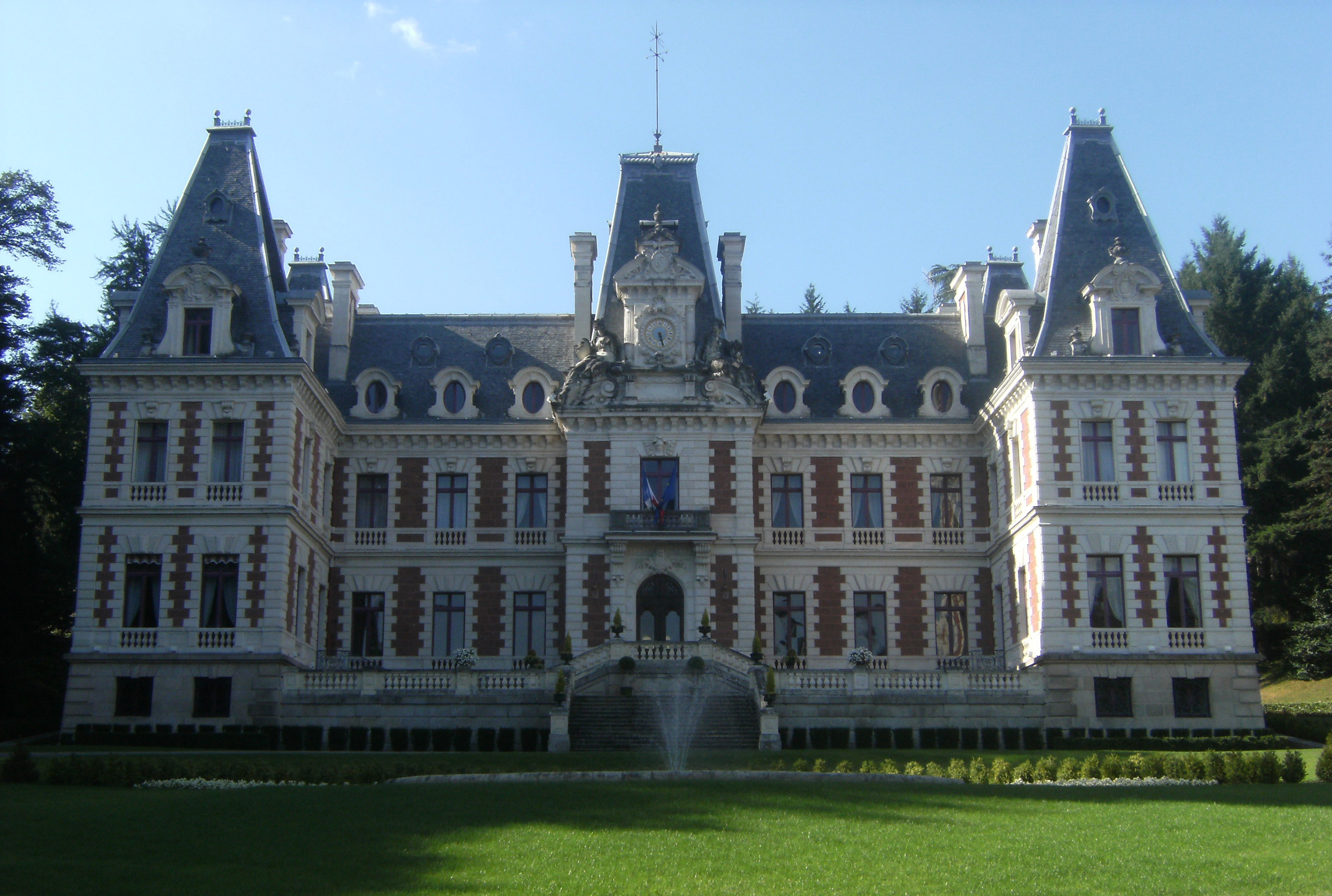 J. Gardès [1] et Félix Élie Xavier Hulot (Français, 1832-1915) [2], architectes: Hôtel de la Préfecture du département de la Corrèze (1864-1880), inscrit monument historique par arrêté du 4 mai 2000, Tulle, Corrèze, France. Pavillon central orné d'une horloge flanquée de grandes figures allégoriques assises symbolisant à gauche L'Industrie et à droite L'Agriculture, exécutées par le sculpteur Aimé-Jules Dalou pour l'atelier du décorateur Eugène Pierre Lefebvre. (Cf. Maurice Dreyfous: Dalou, sa vie et son oeuvre, Paris, Laurens, 1903)